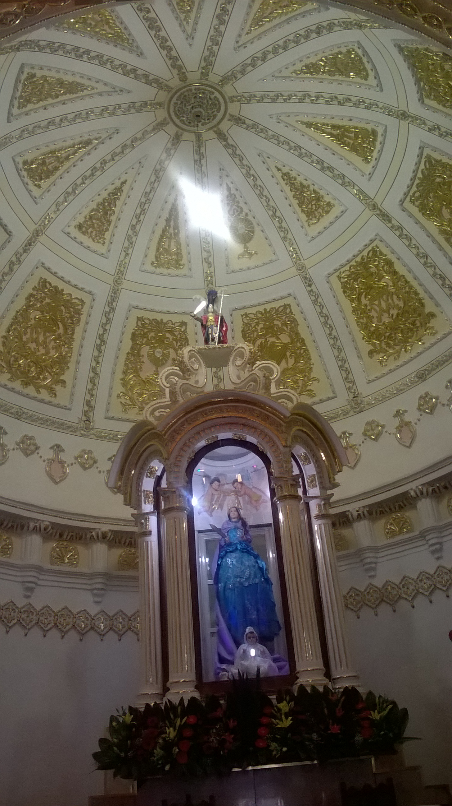 Iglesia de Santa Apolonia Teacalco, Tlaxcala